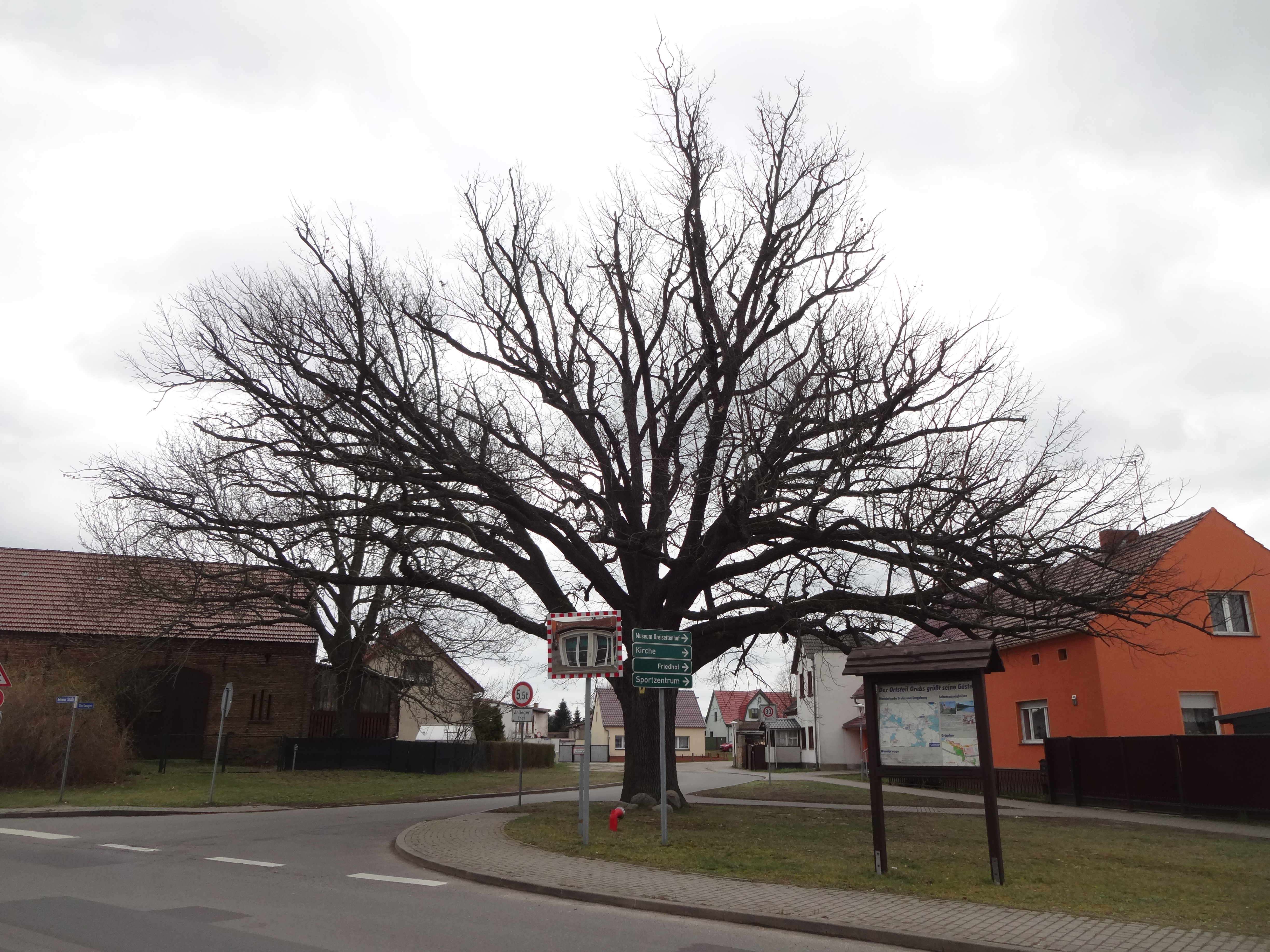 als Naturdenkmal geschützte Friedens-Eiche auf dem Dorfplatz in Grebs